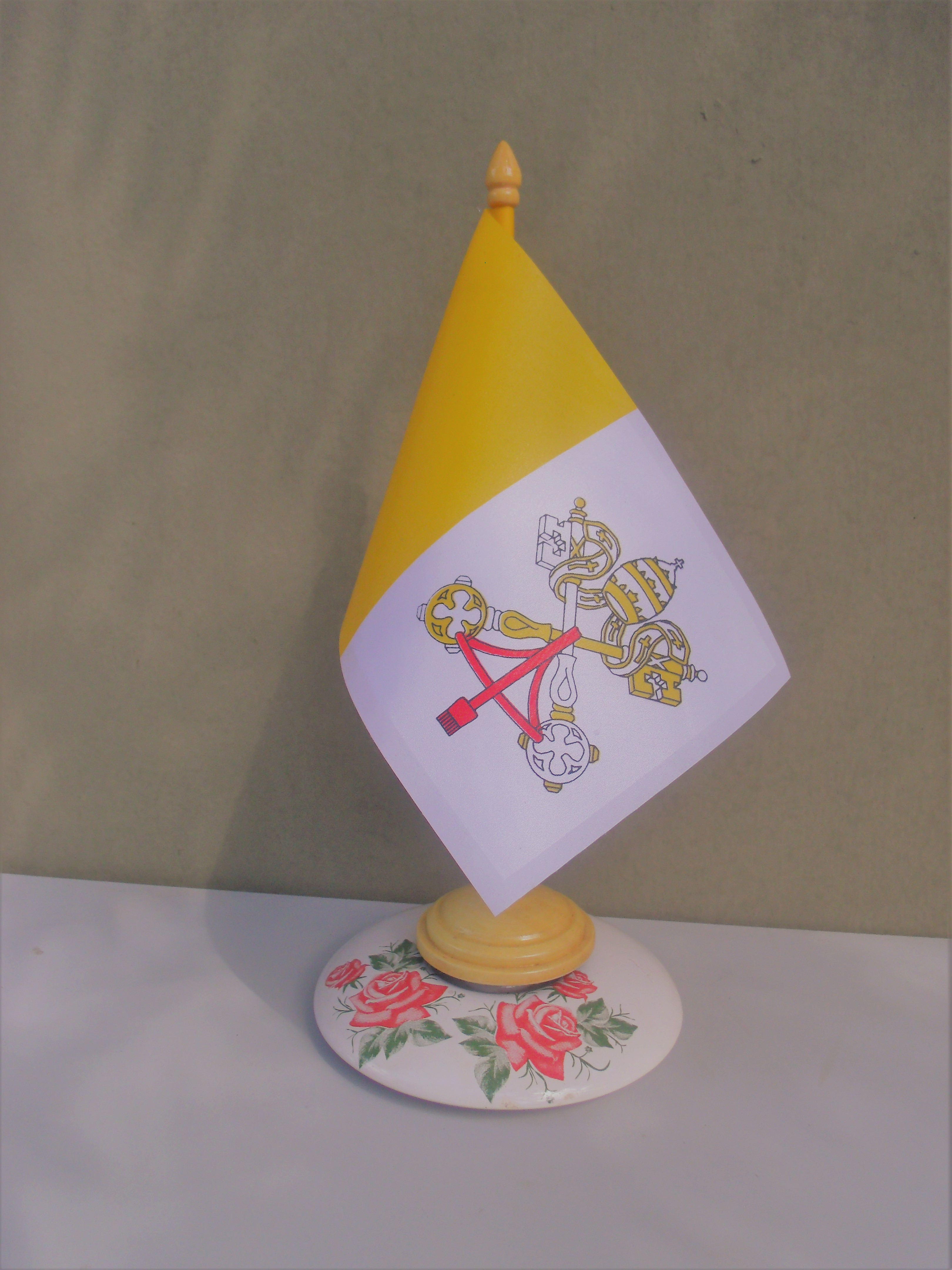 Versão de mesa da Bandeira do Estado da Cidade do Vaticano.